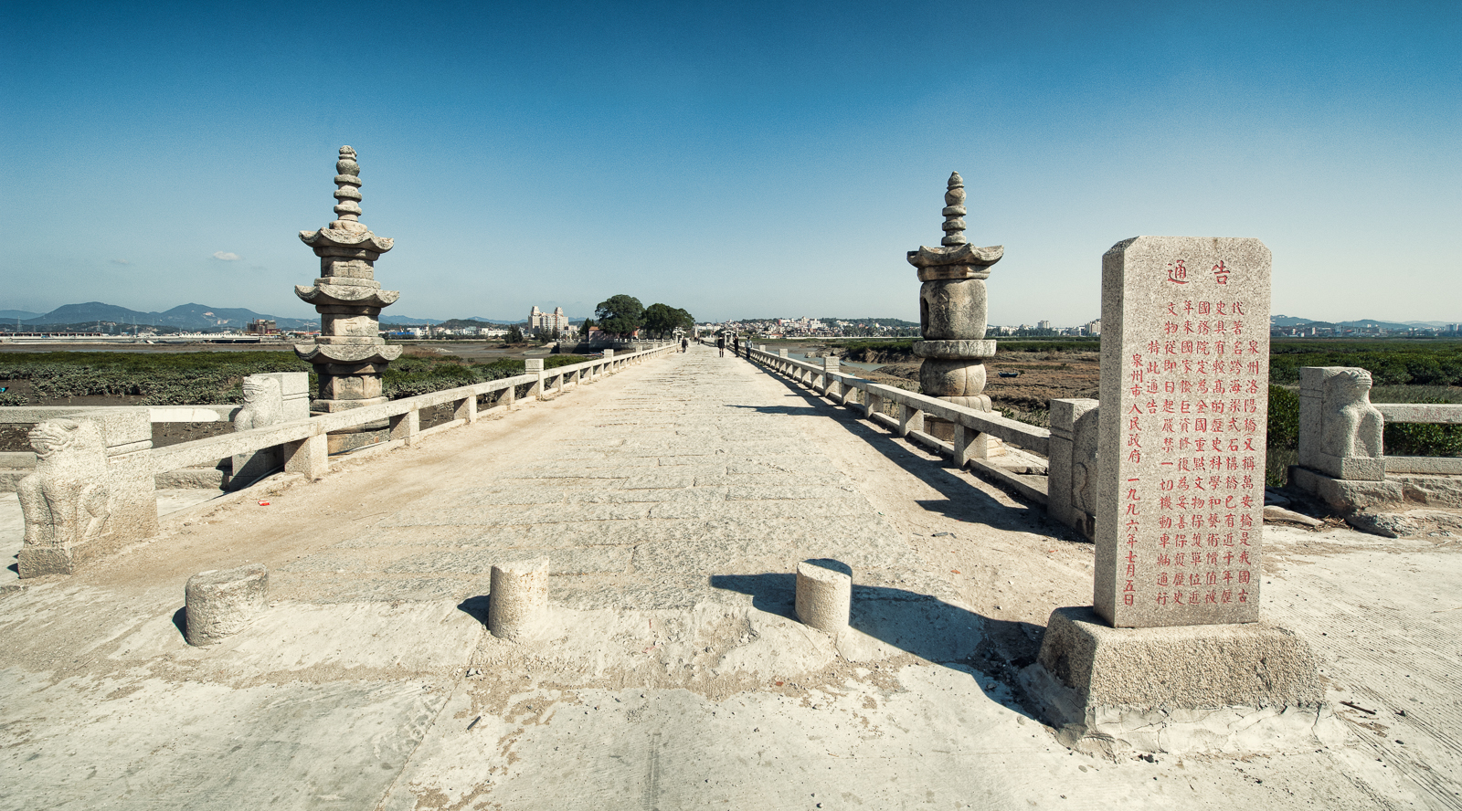 Quanzhou 1053-1059, Song Dynasty